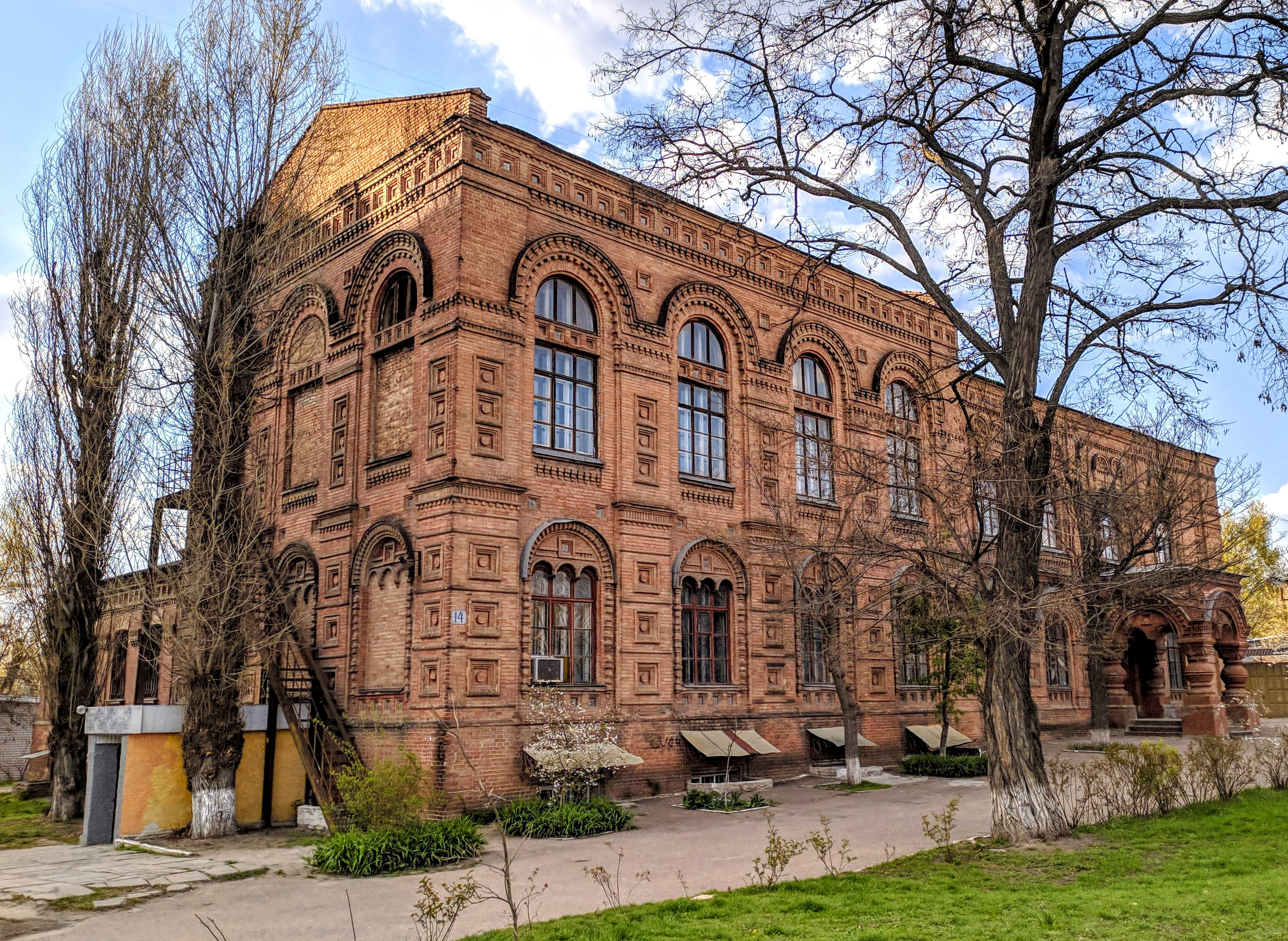 Колишнє ремісниче грамотне училище, Кропивницький, вул. Вокзальна (Жовтневої Революції), 20